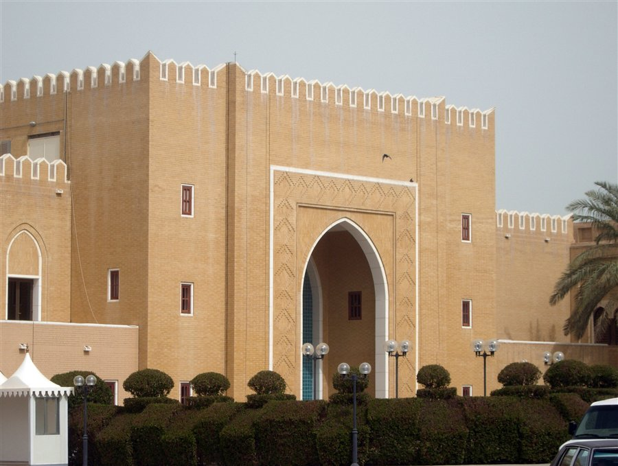 Kuwait